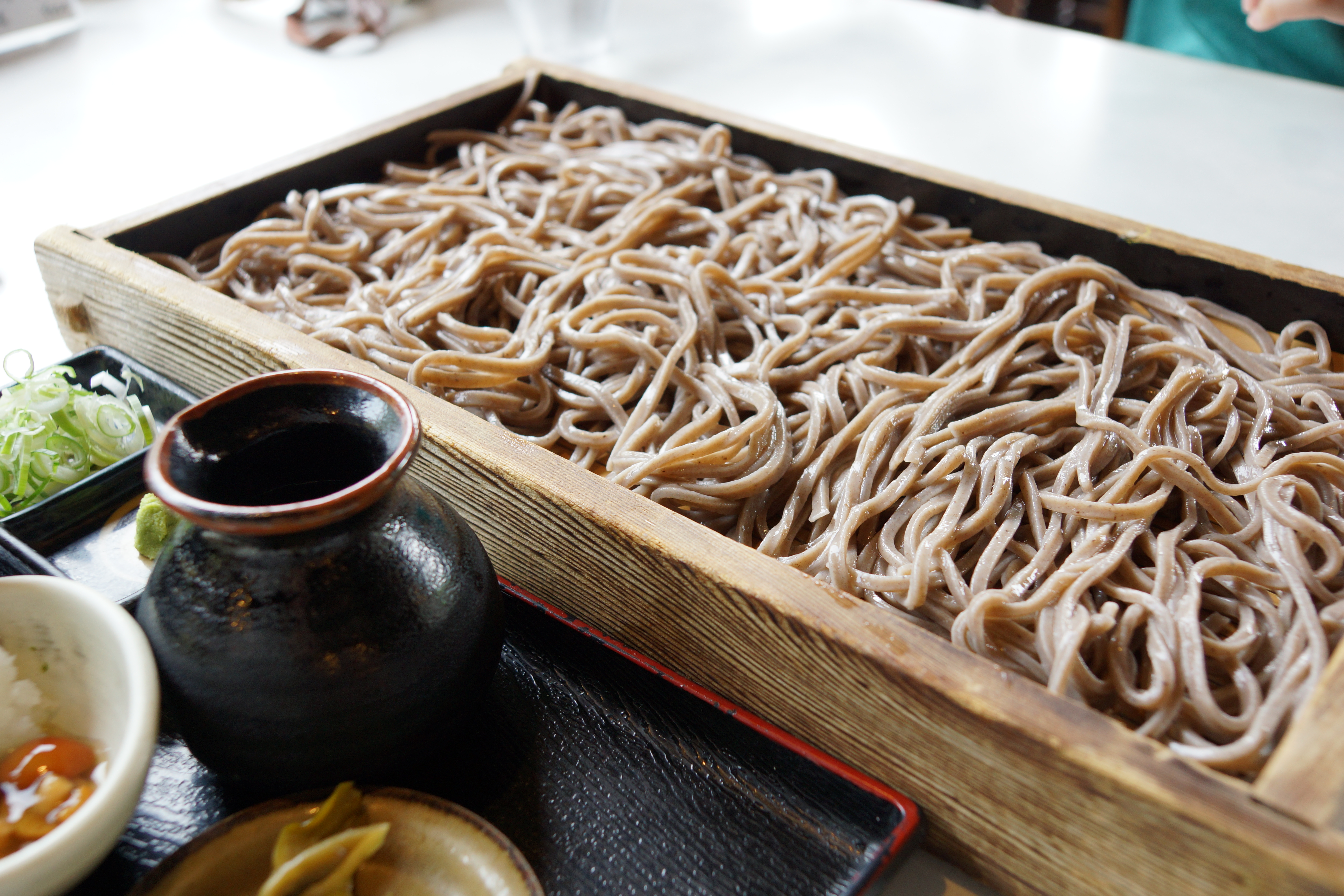 Ita Soba by ume-y